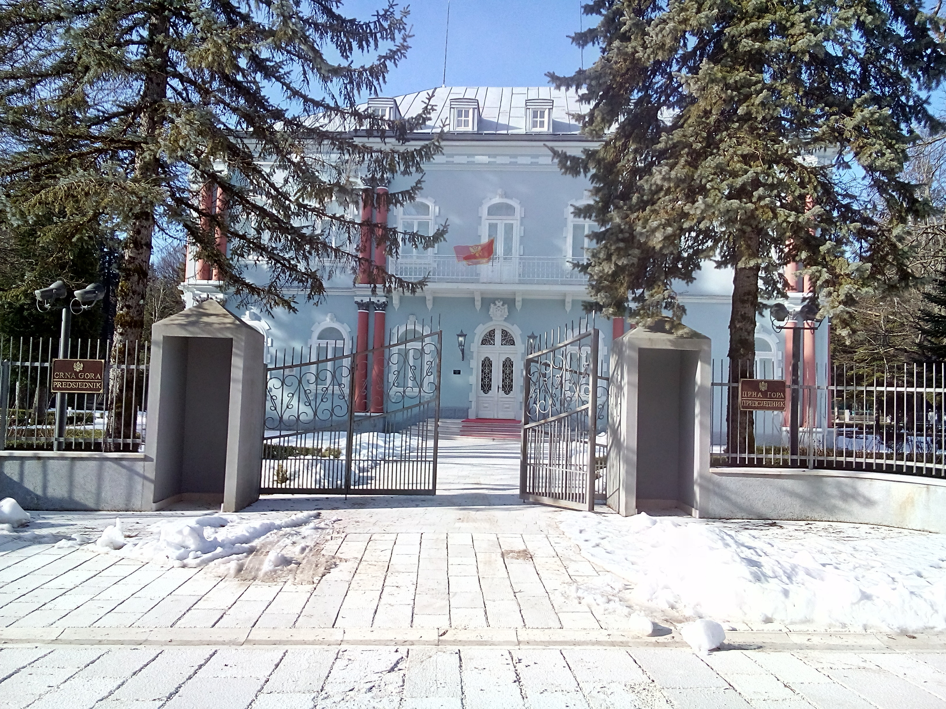 Черногория